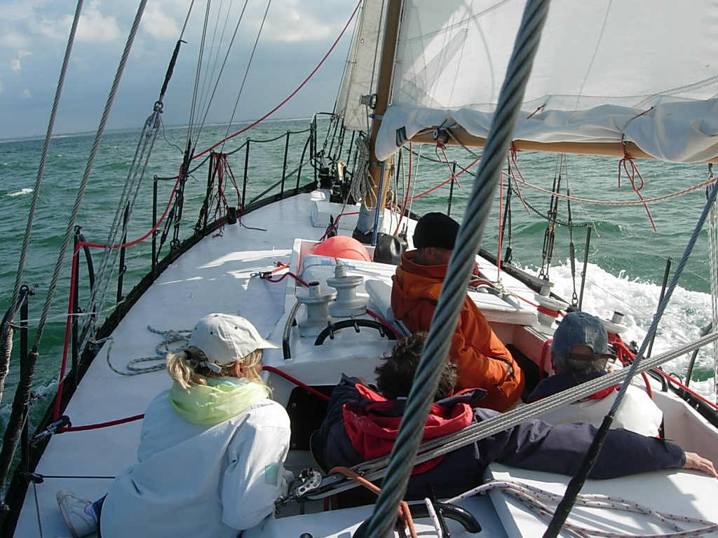 Joshua le ketch de Bernard Moitessier est entretenu et navigue grâce à l'association des Amis du musée Maritime de La Rochelle